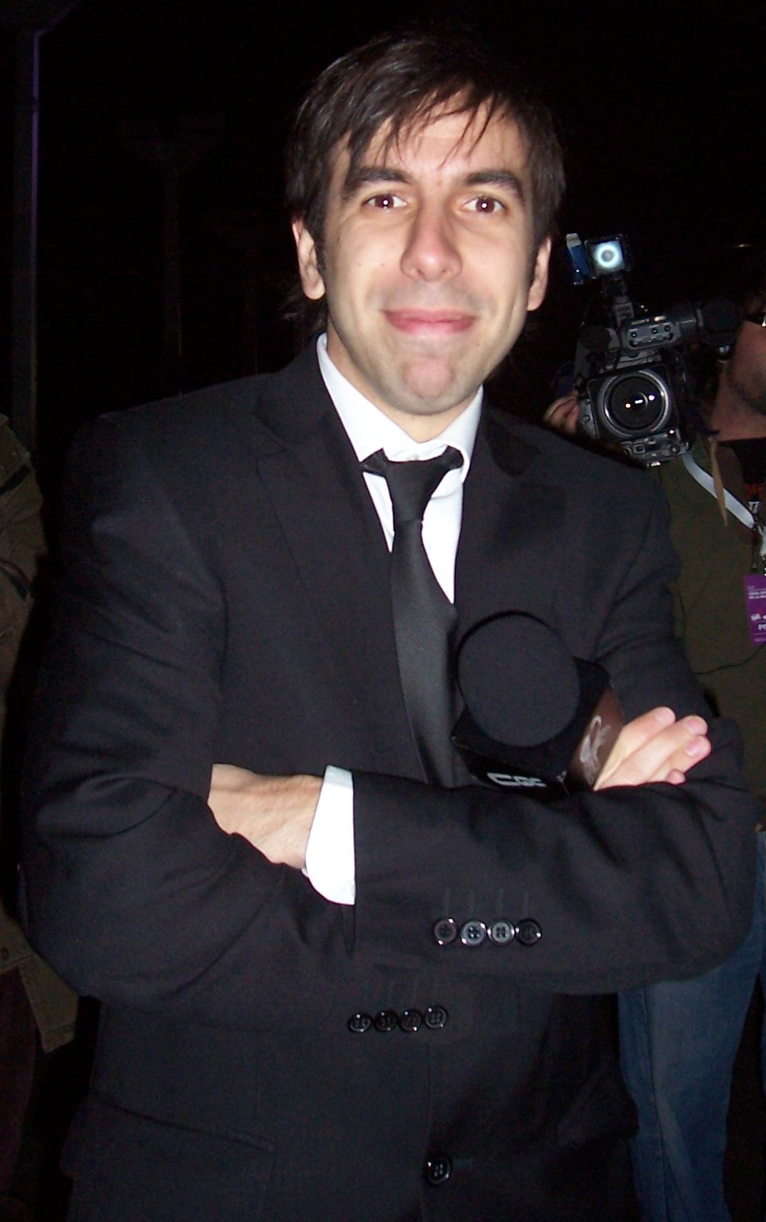 El periodista argentino Clemente Cancela en la 3º Feria Internacional de Música (BAfim) en Buenos Aires, Argentina.